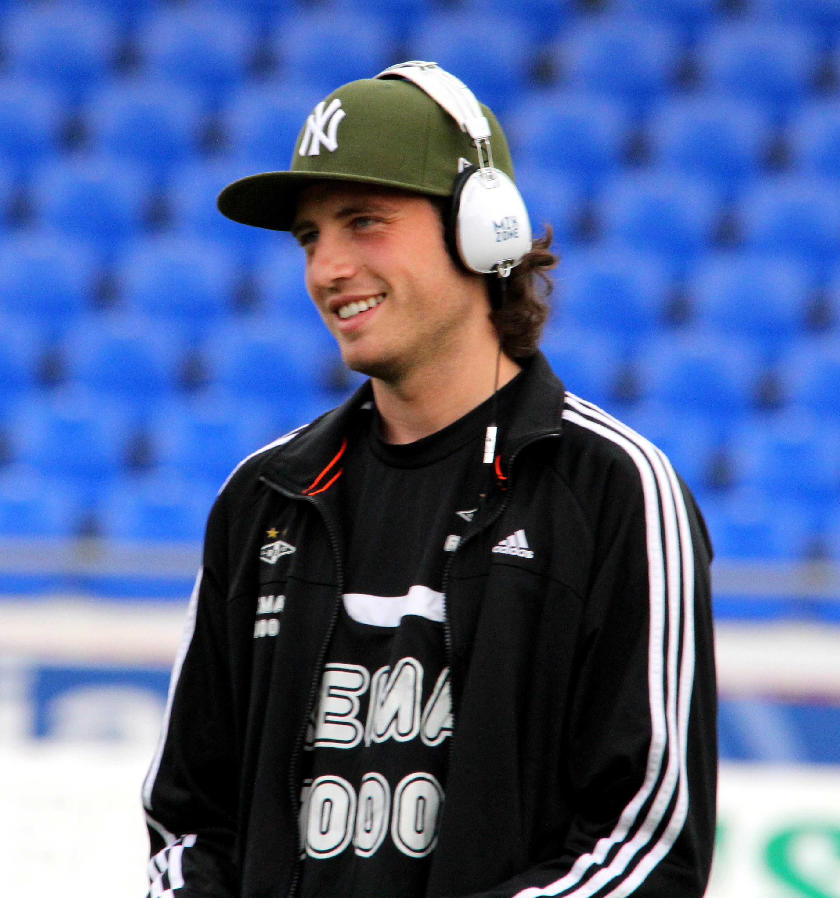 Mikkel Diskerud på Sandnes stadion 25. august 2013